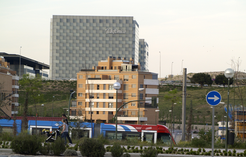 Telefónica Headquarters in Las Tablas, Madrid